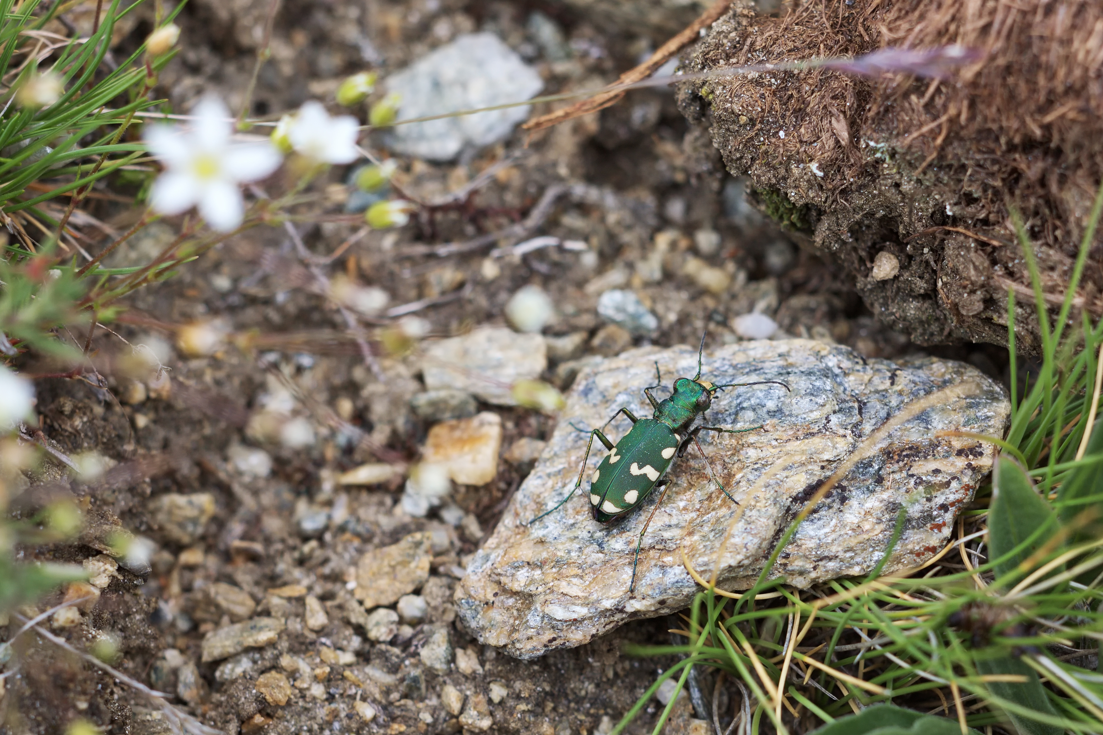 Gallischer Sandlaufkäfer; aufgenommen oberhalb der Täschhütte in den Walliser Alpen, in einer Höhe von knapp 2800 m über Null.